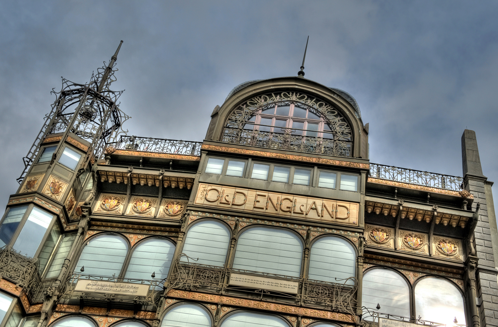 Magasin Old England Actuellement musee des instruments de musique a Bruxelles